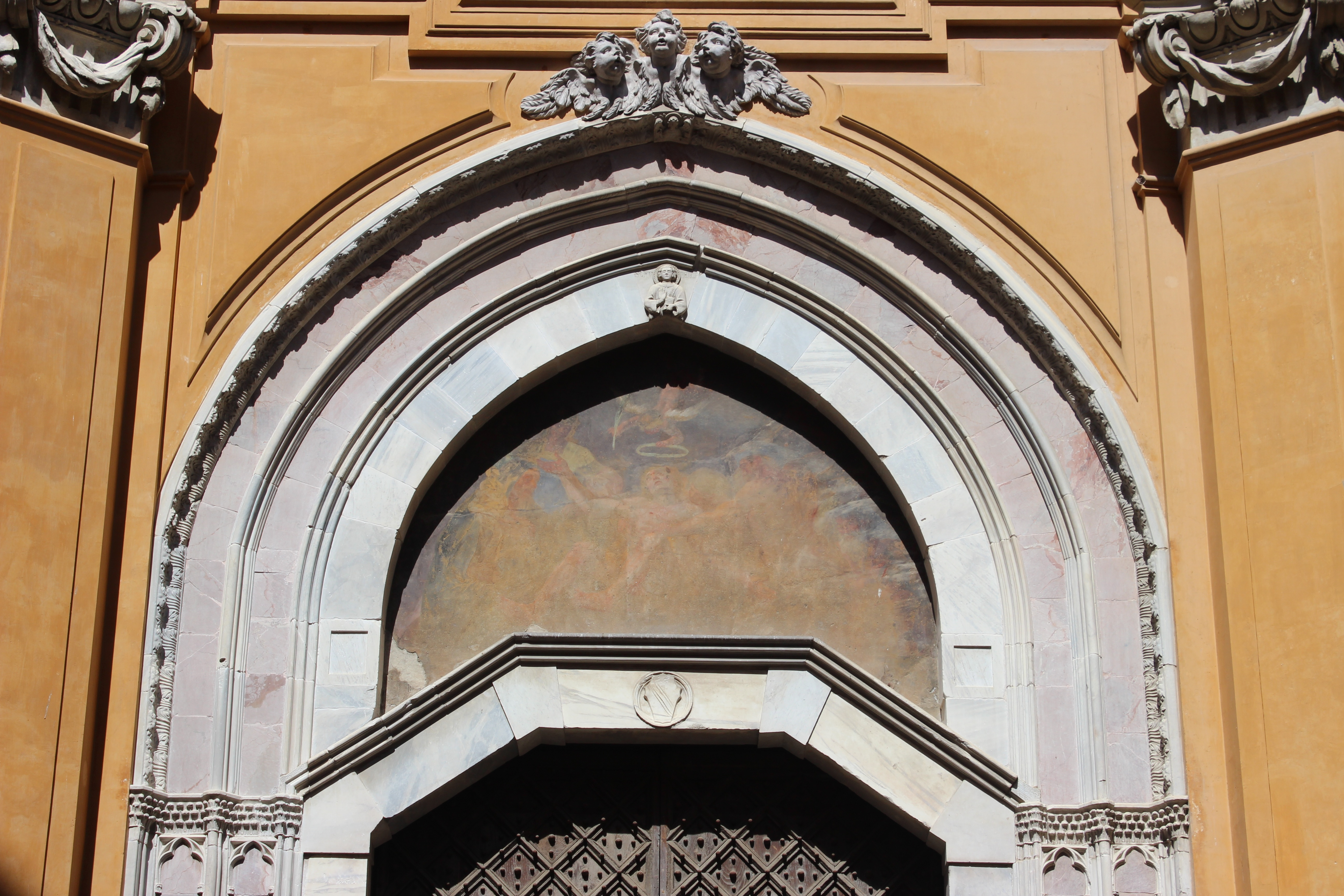 Nápoles. San Lorenzo Maggiore. Fachada.